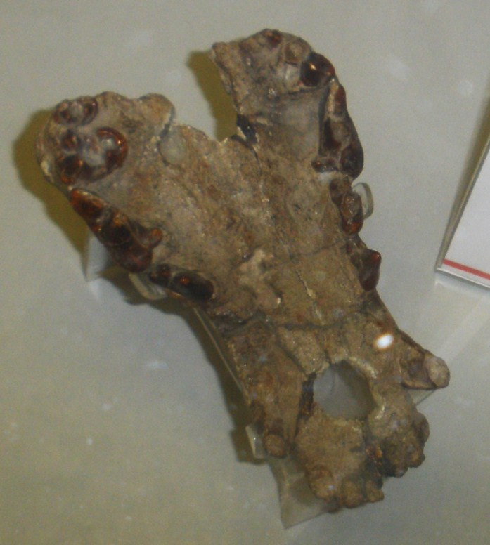 Fossil of Xenocyon, an extinct mammal -- Topok the picture at Museo di Paleontologia di Firenze